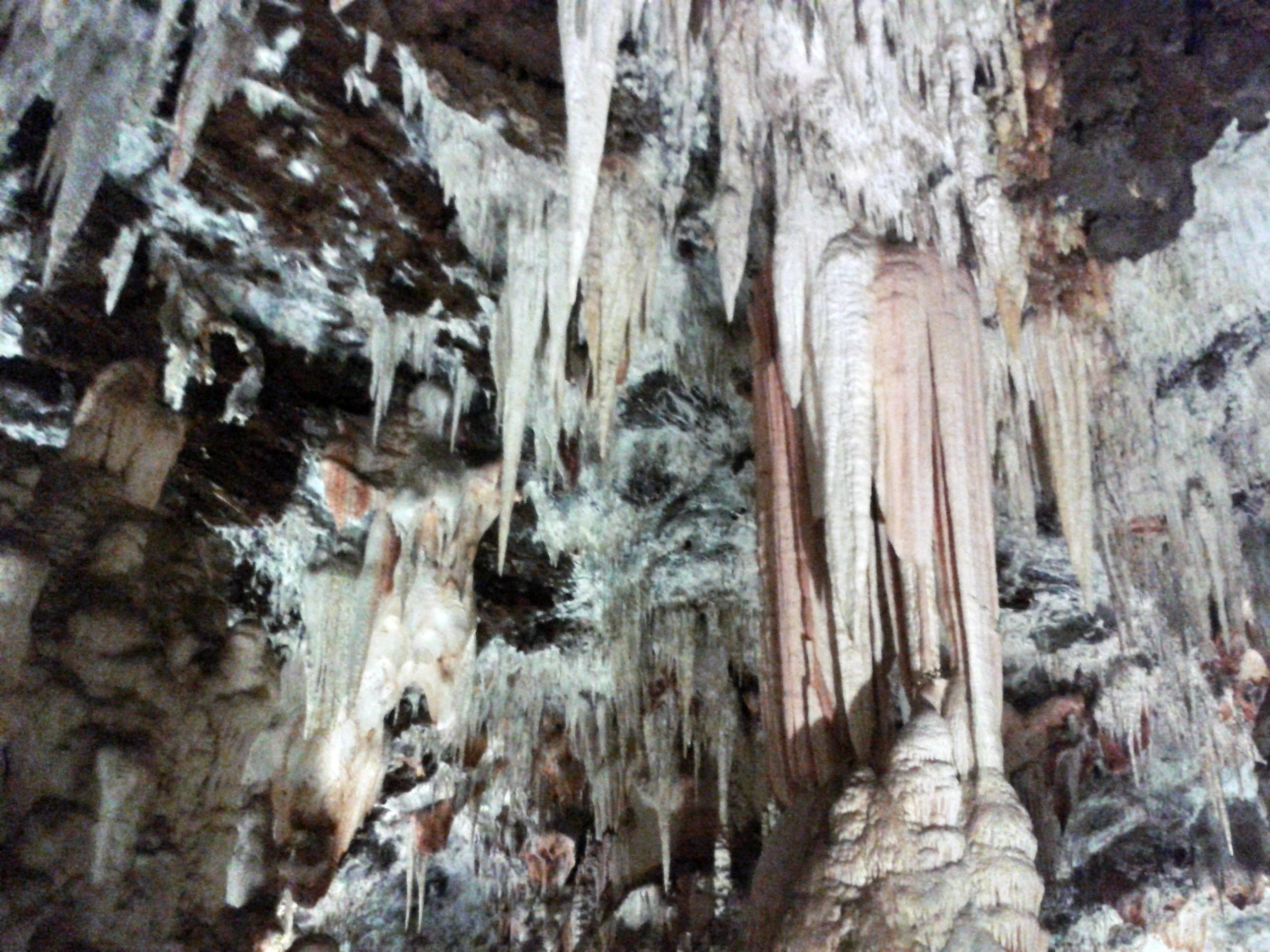 Foto del interior de Cuevas del Águila, situadas en Ramacastañas (Ávila)